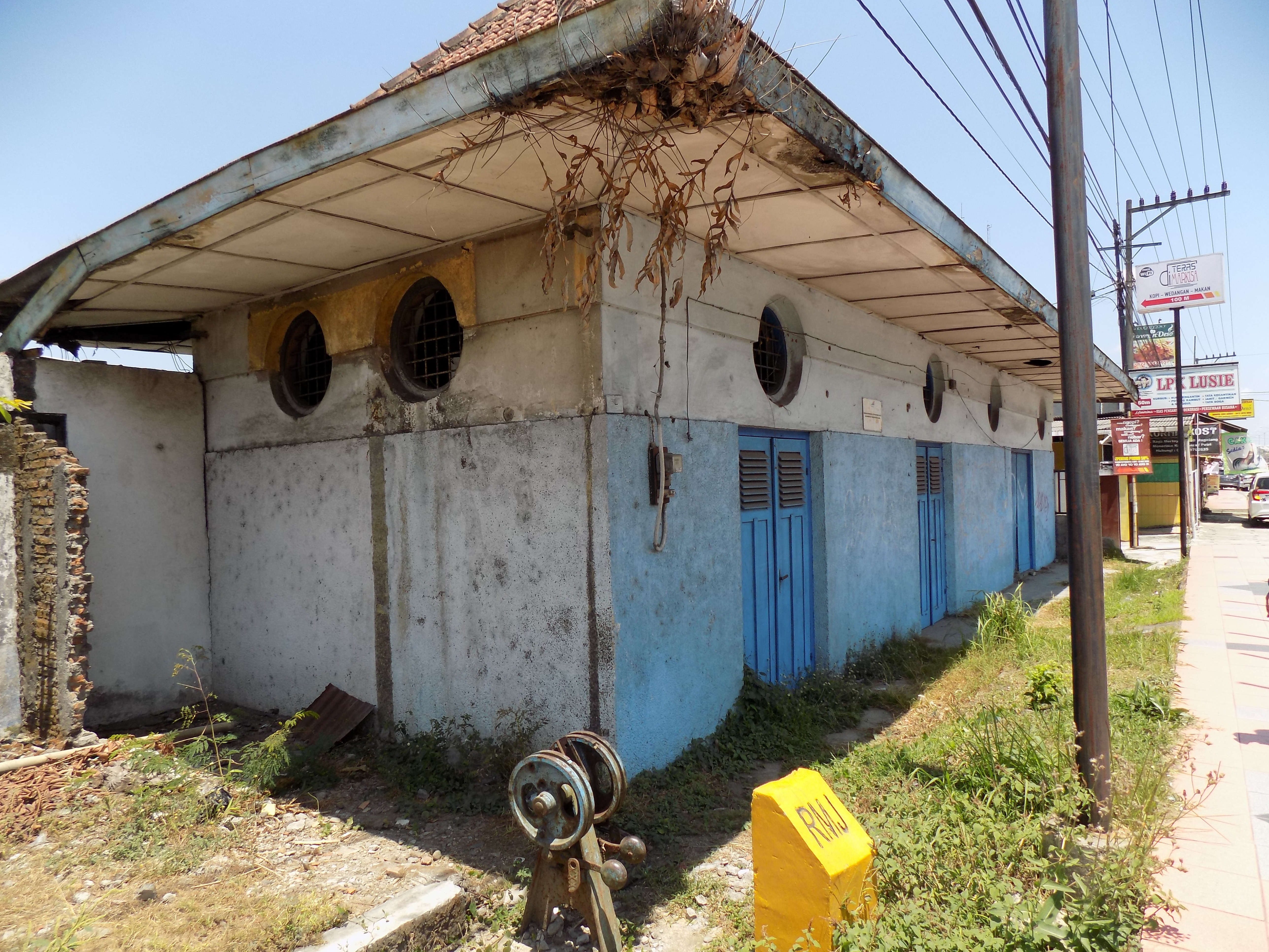 Stasiun Mertoyudan yang kini menjadi PAM